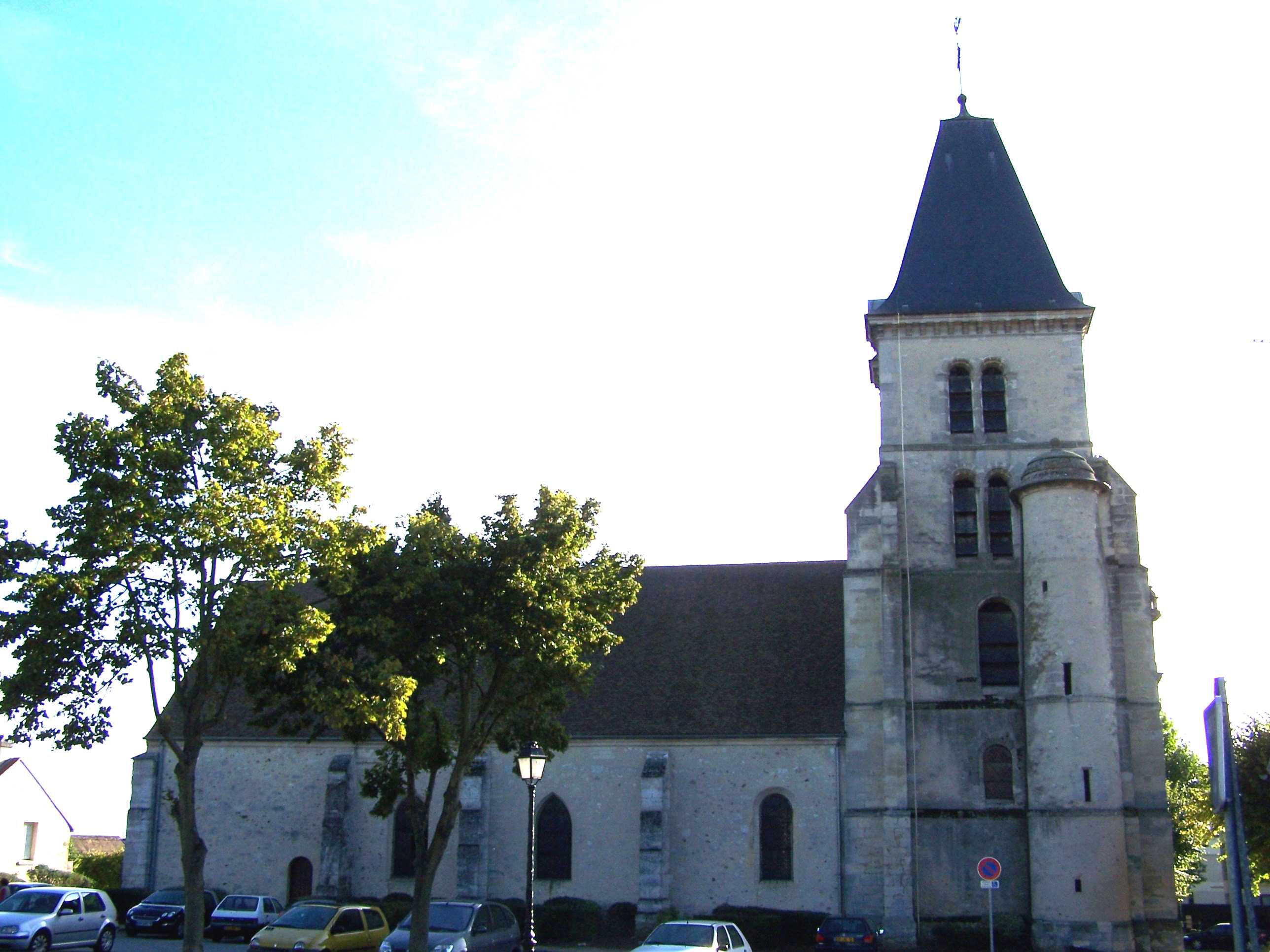 Église de Saint-Nom-la-Bretèche (Yvelines, France), face nord